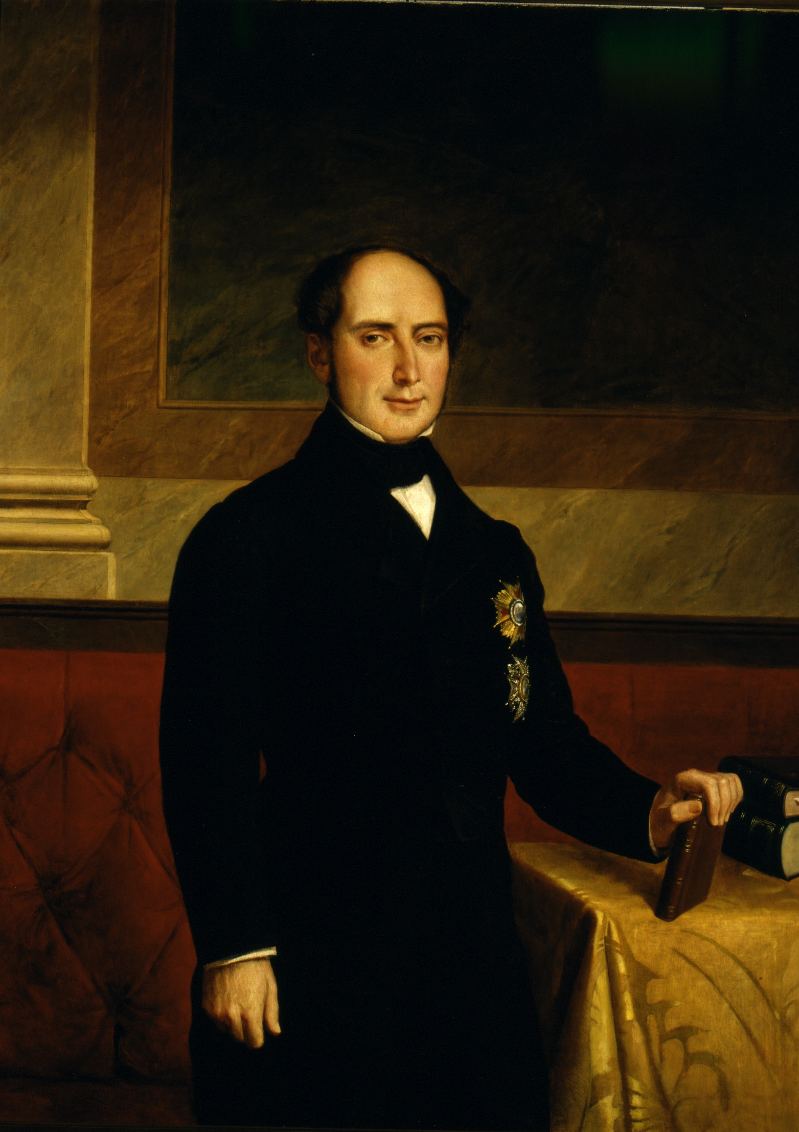 Retrato del politico español Francisco de Paula Castro y Orozco (1809-1847). Durante la regencia de María Cristina y en nombre de Isabel II, fue ministro de Gracia y Justicia en el año 1837. Pero al ser partidario de la madre de la reina, fue apartado cuando Baldomero Espartero asumió la regencia y no regresó a la actividad pública hasta 1844 cuando fue elegido diputado al Congreso, ocupando la presidencia de la Cámara en tres períodos hasta 1847. También fue magistrado del Tribunal Supremo de Guerra y Marina.